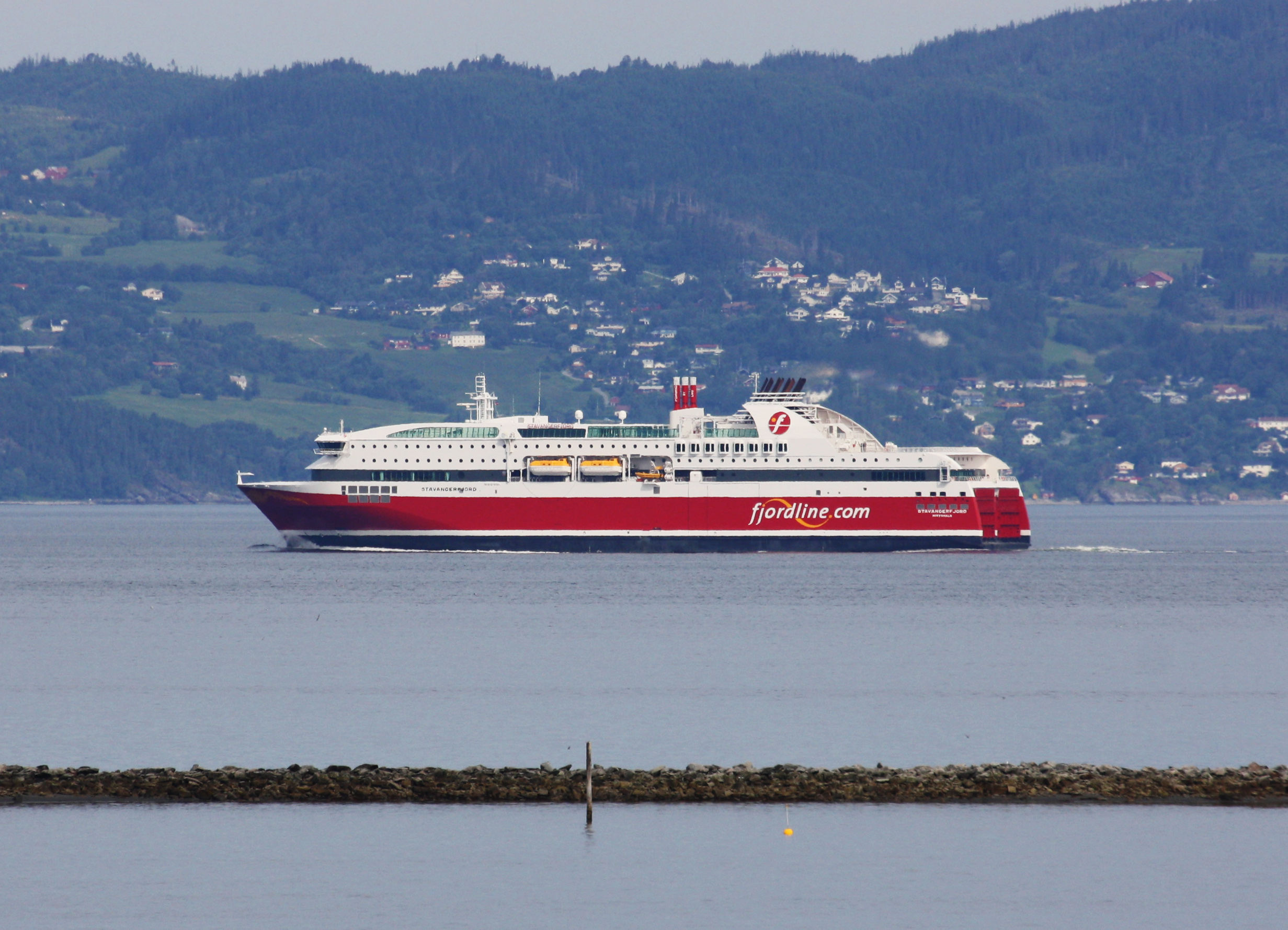 Fjord Lines nye cruiseferje Stavangerfjord på prøvetur i Trondheimsfjorden.